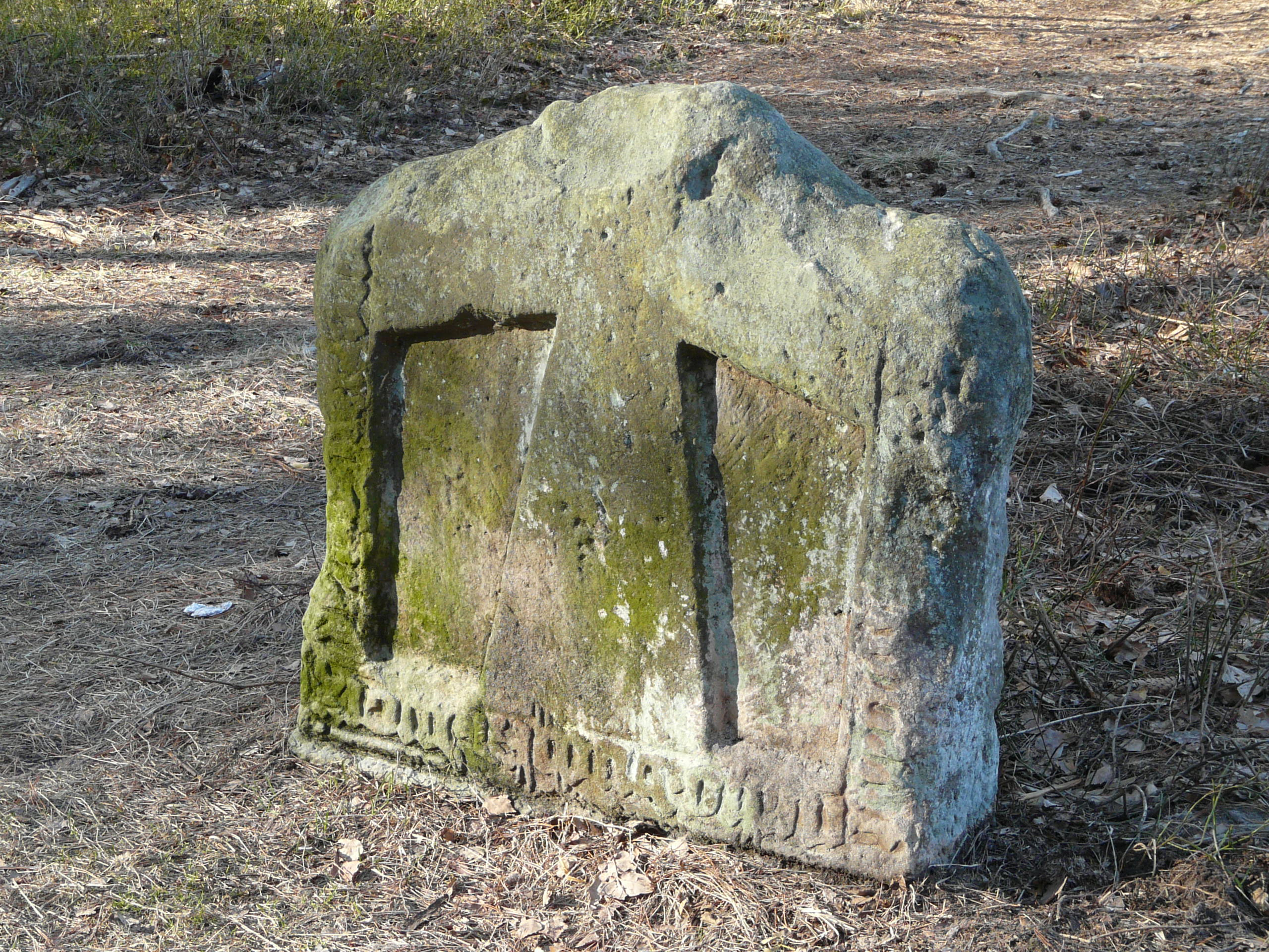 Smírčí kámen s vytesaným křížkem (Běleč nad Orlicí), po pravé straně lesní cesty z Bělče do Malšovy Lhoty, Běleč nad Orlicí